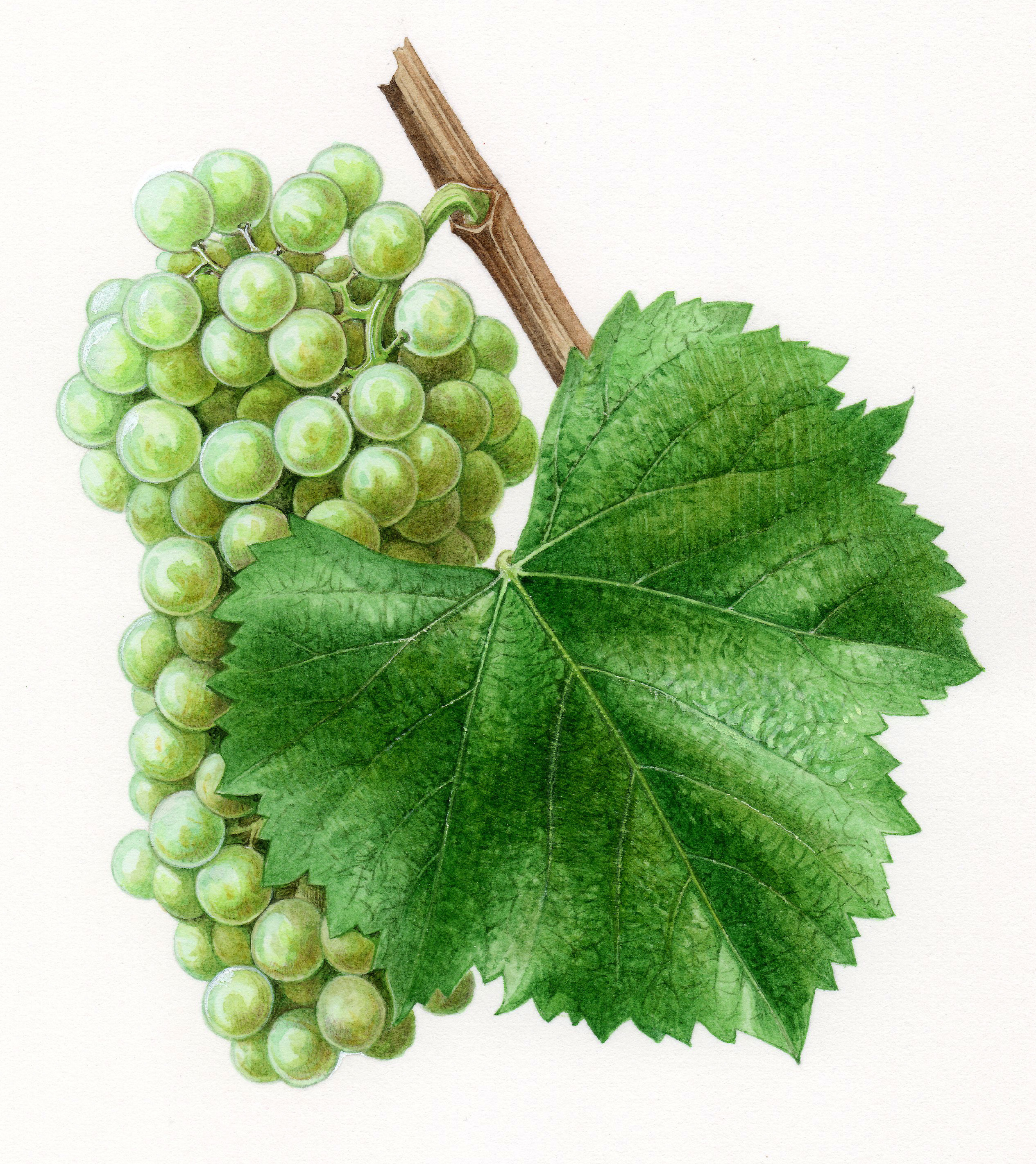 Aquarelle originale pour les Cépages de France (2001)